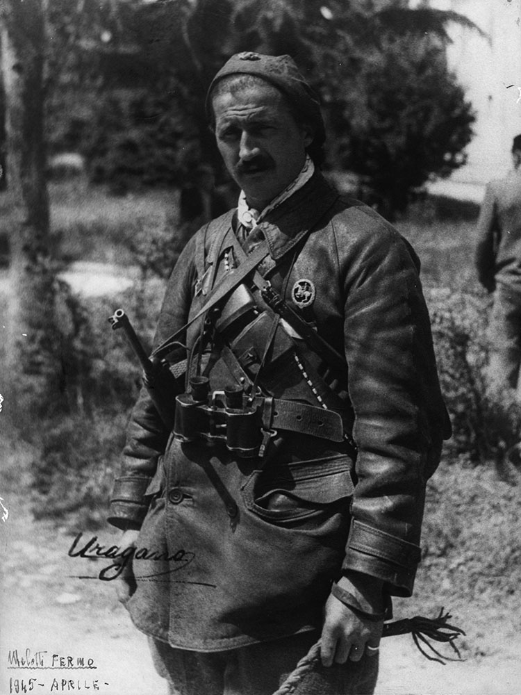 Fermo Melotti "Uragano"